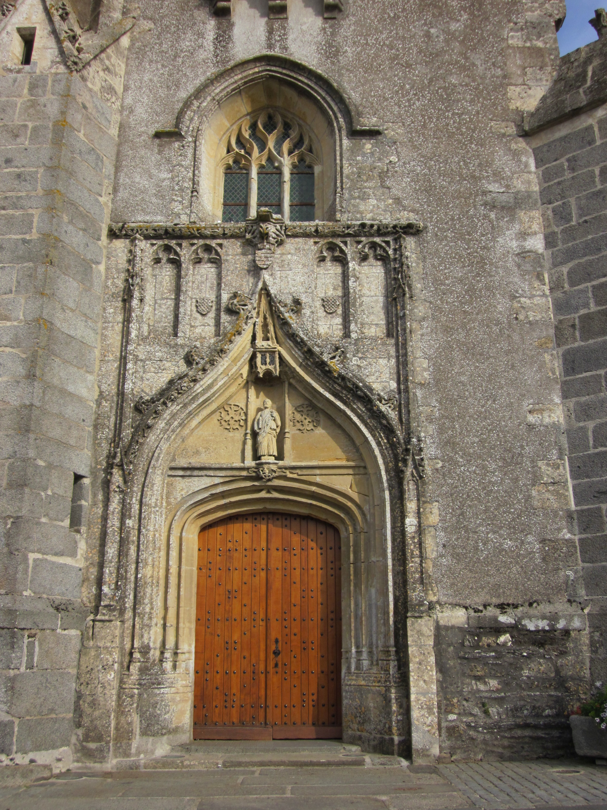 Porche de l'église Saint-Pierre. Commune de Saint-Pierre du Chemin (Vendée).